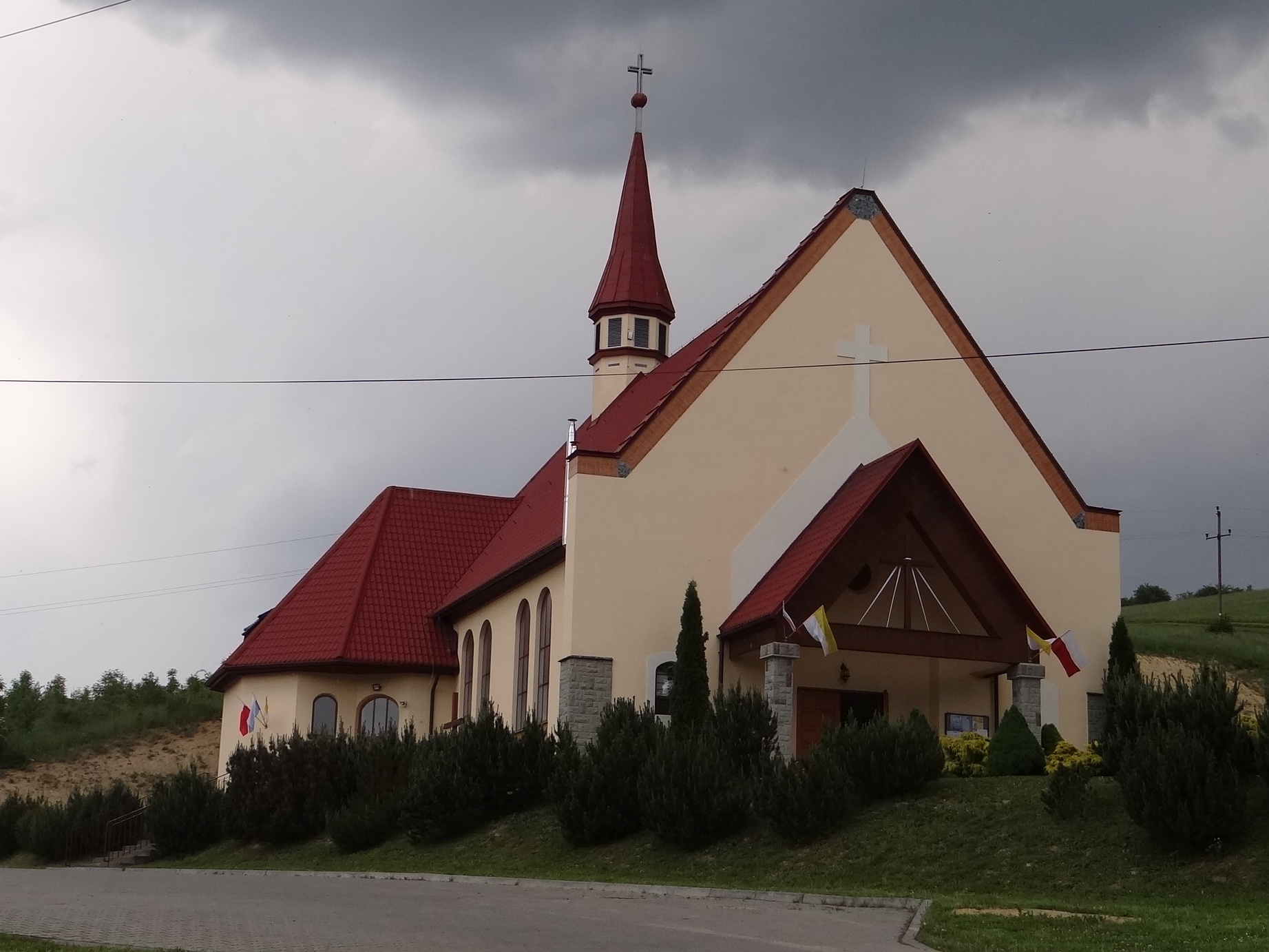 Kościół w Wojnarowej